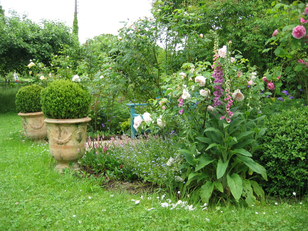 Jardin botanique à la Faulx de Dole en Franche Comté - France